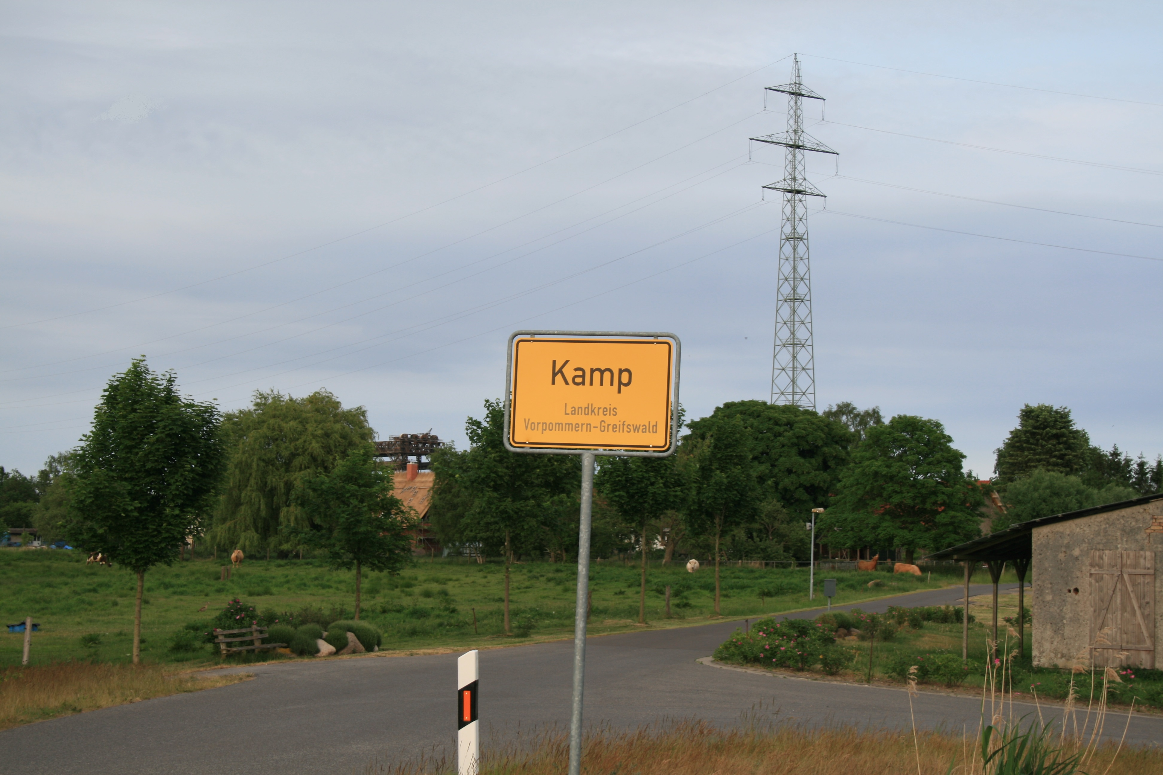 Westlicher Ortseingang von Kamp, Mast der 110-kV-Leitung Anklam–Bansin